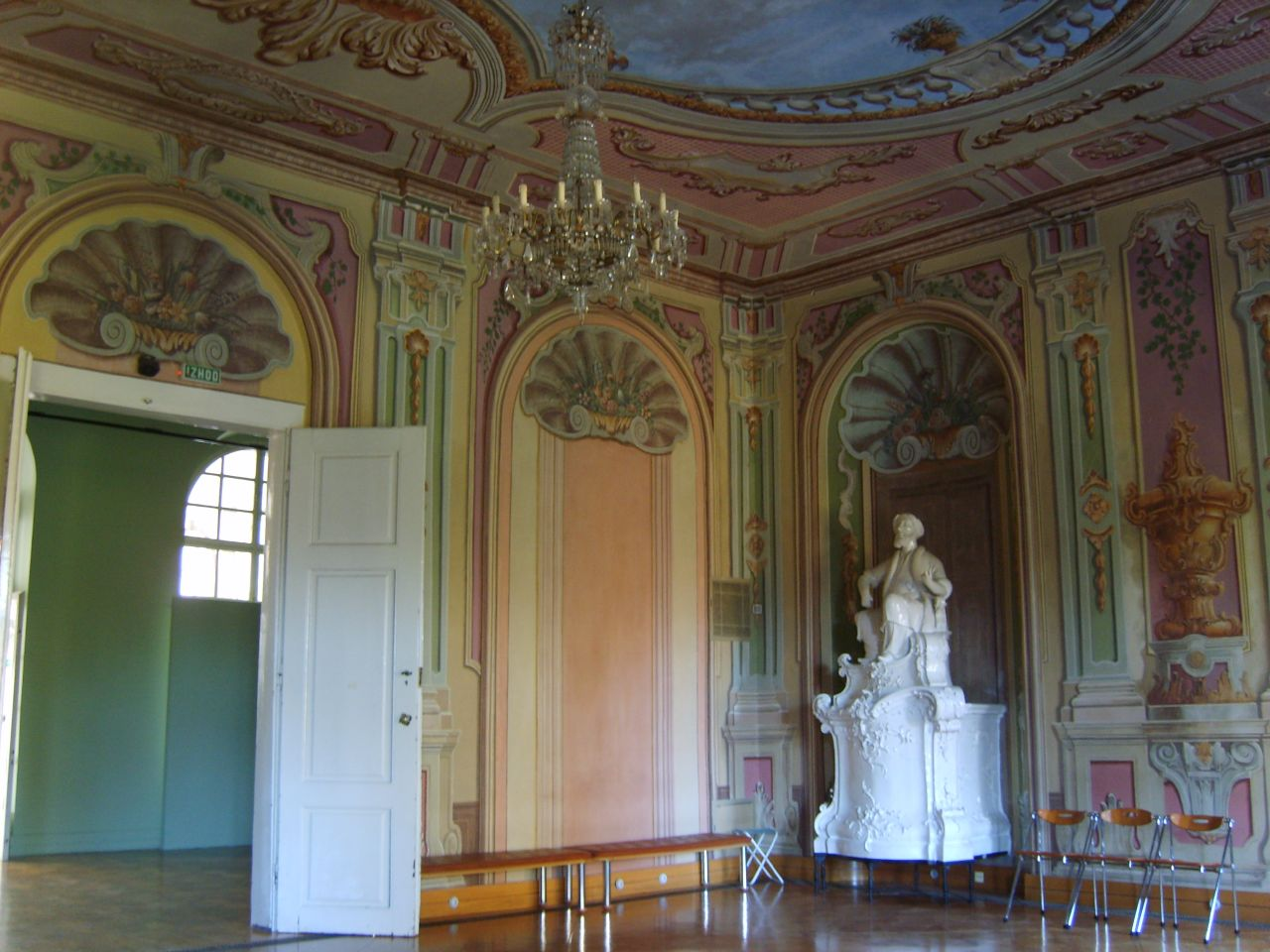 Ljubljana museum in Tivoli Park